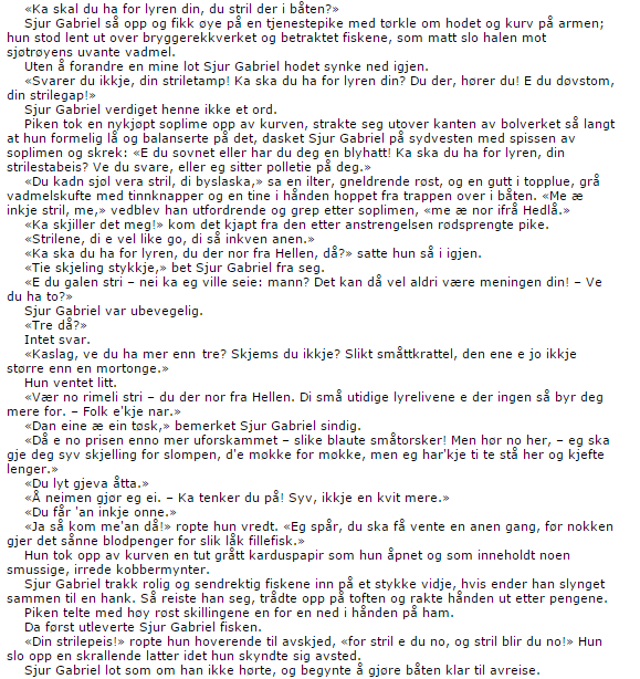 Utdrag frå boka Sjur Gabriel